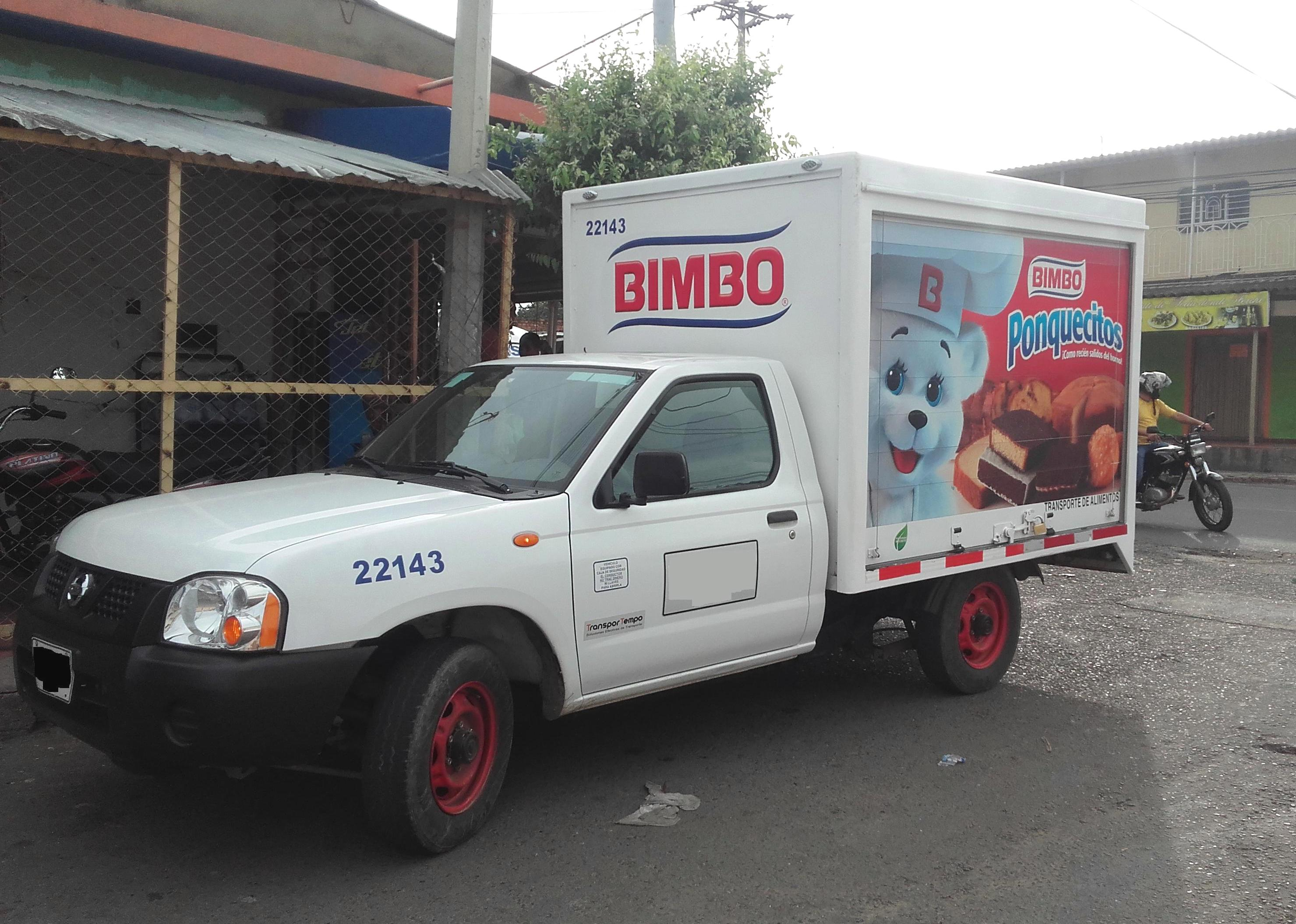 Carro Bimbo en Cúcuta, Colombia